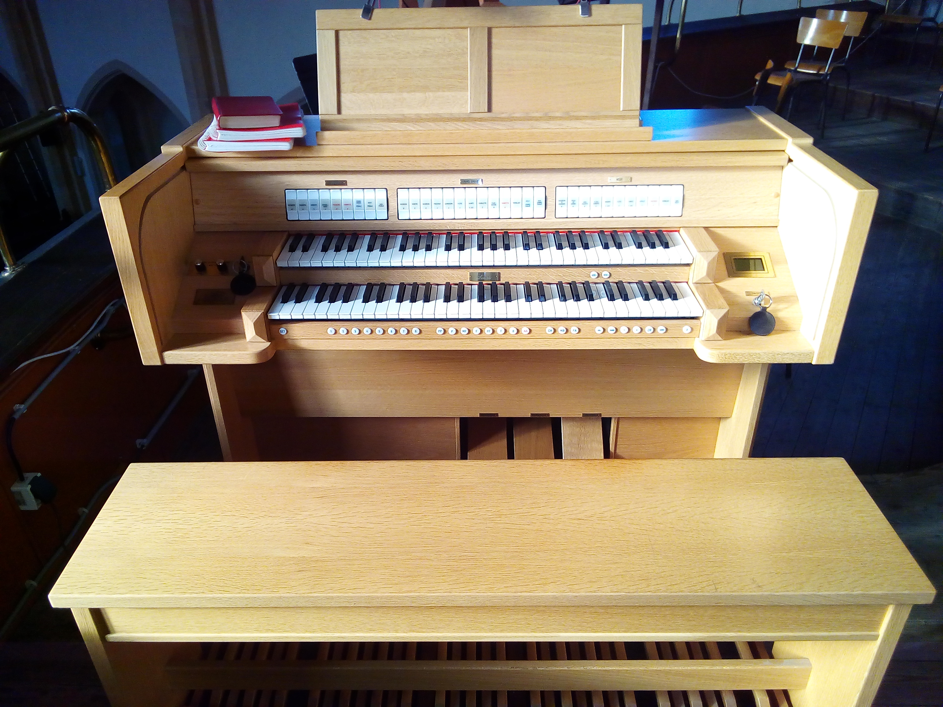 orgue